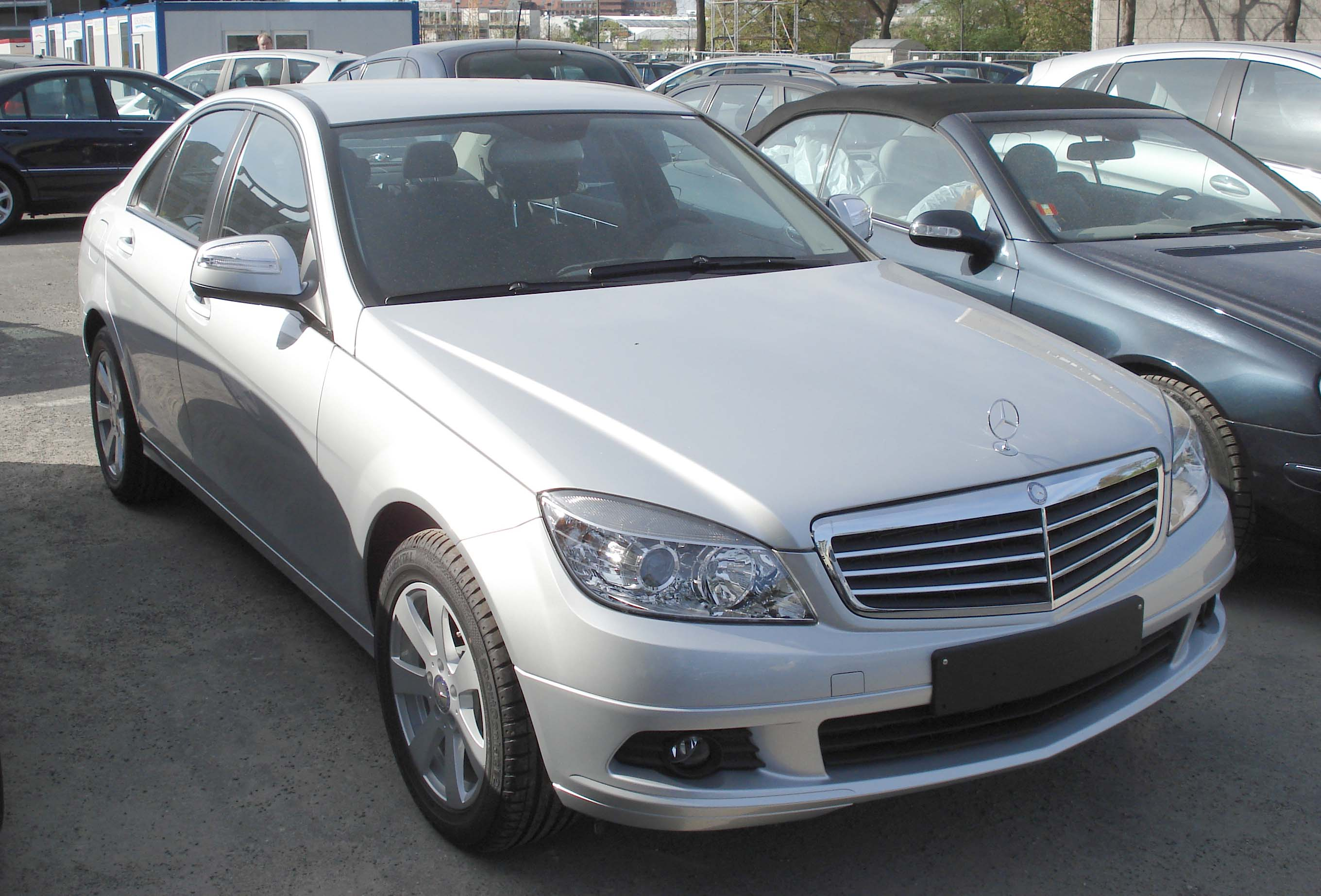 Mercedes-Benz C-Class (W204)